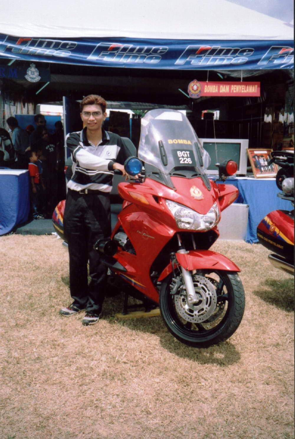 Gambar penulis bersama-sama motosikal Jabatan Bomba dan Penyelamat Malaysia sempena Karnival Sure Heboh (kini Jom Heboh) 2004 di Johor Bahru, Johor.